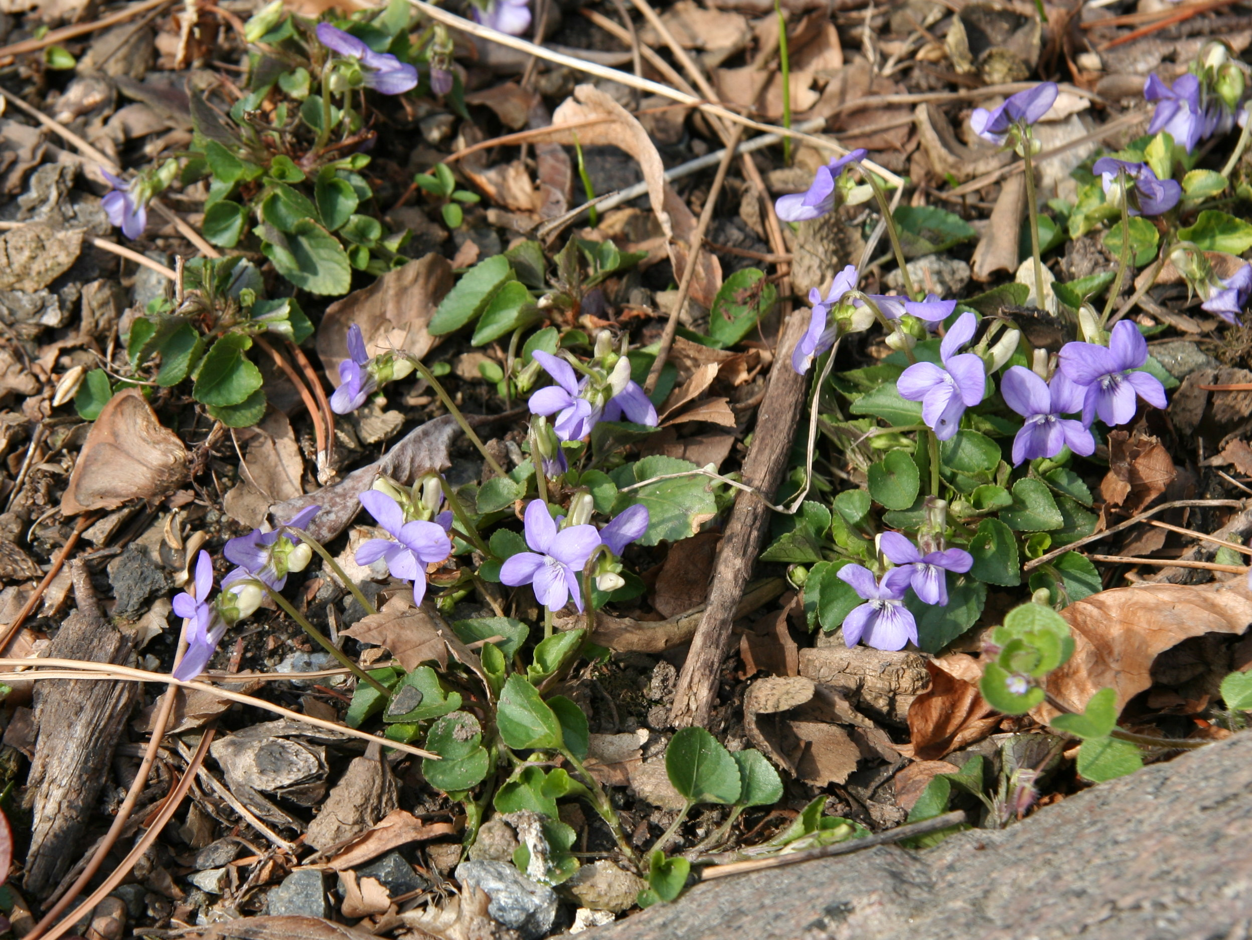 Viola missouriensis im Botanischen Garten Dresden